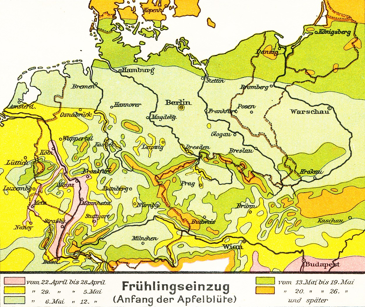 Deutschland, Frühlingseinzug (Anfang der Apfelblüte) This is a part of an old atlas. It does not represent the current situation.